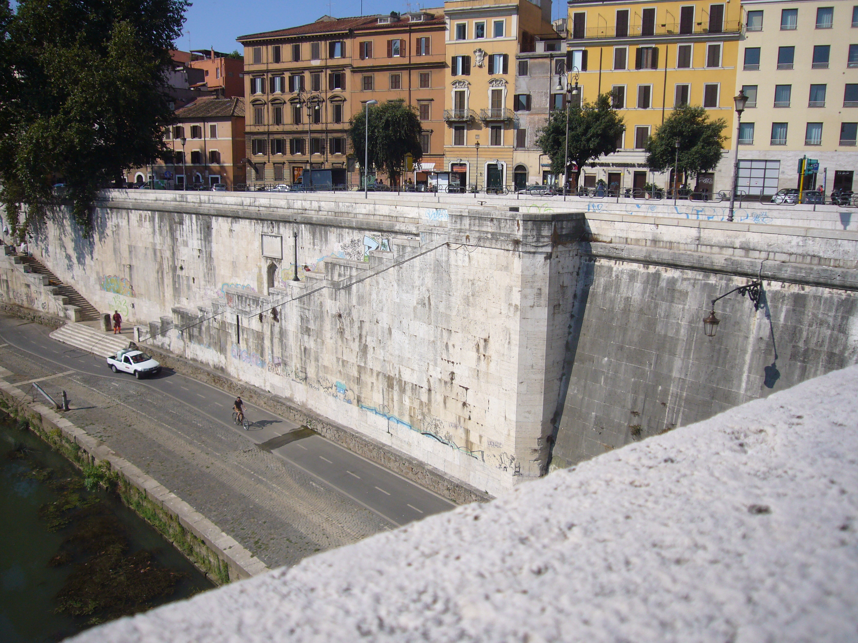 Roma, scalinate dell'antico Porto Leonino, sotto piazza della Rovere